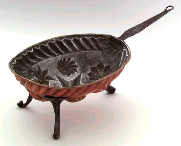 Puddingform drevet i kobber med føtter og skaft av jern og fortinning innvendig.